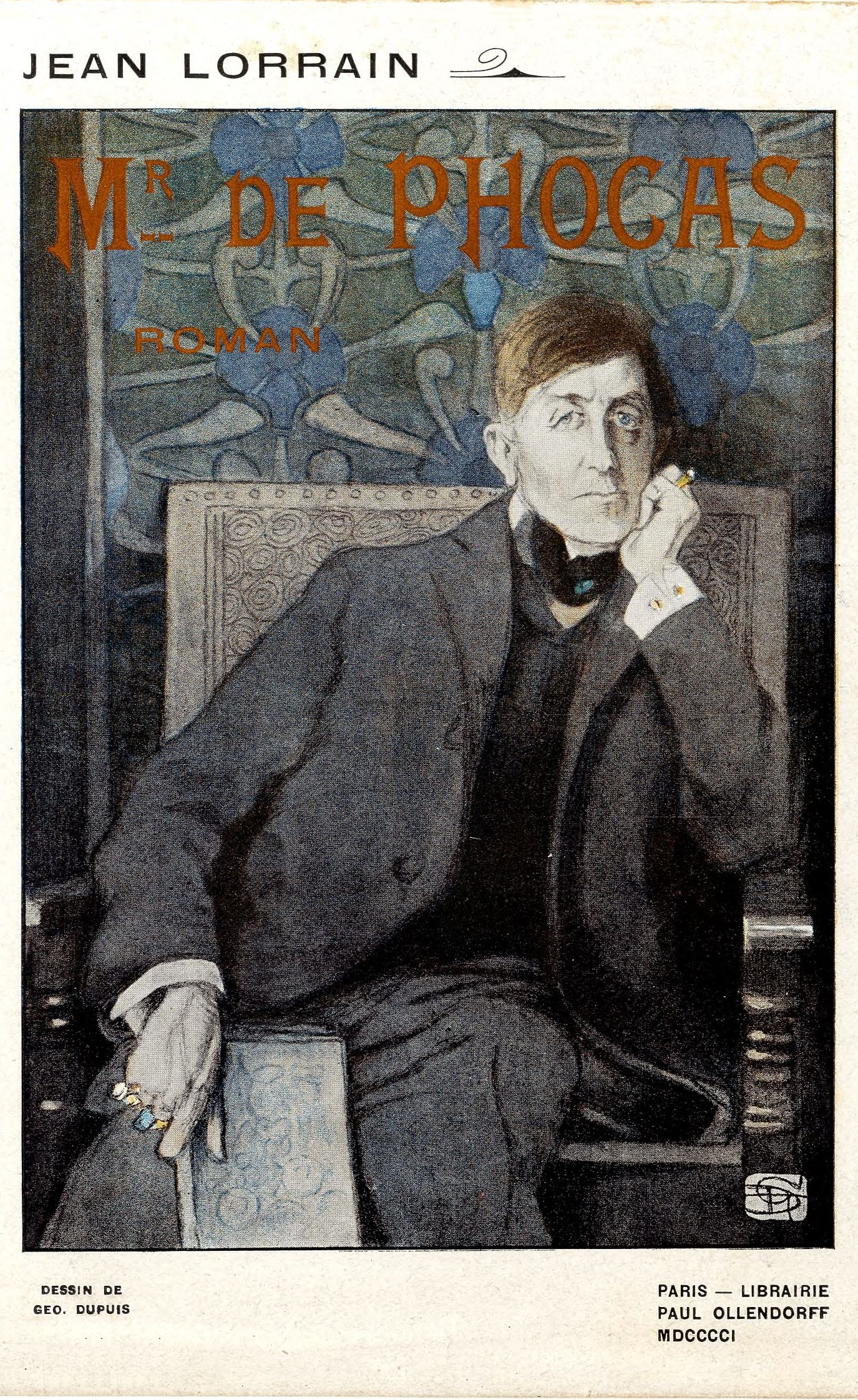 Couverture de Mr de Phocas de Jean Lorrain, bois de Géo Dupuis, Paris, Librairie Paul Ollendorff, 1908.